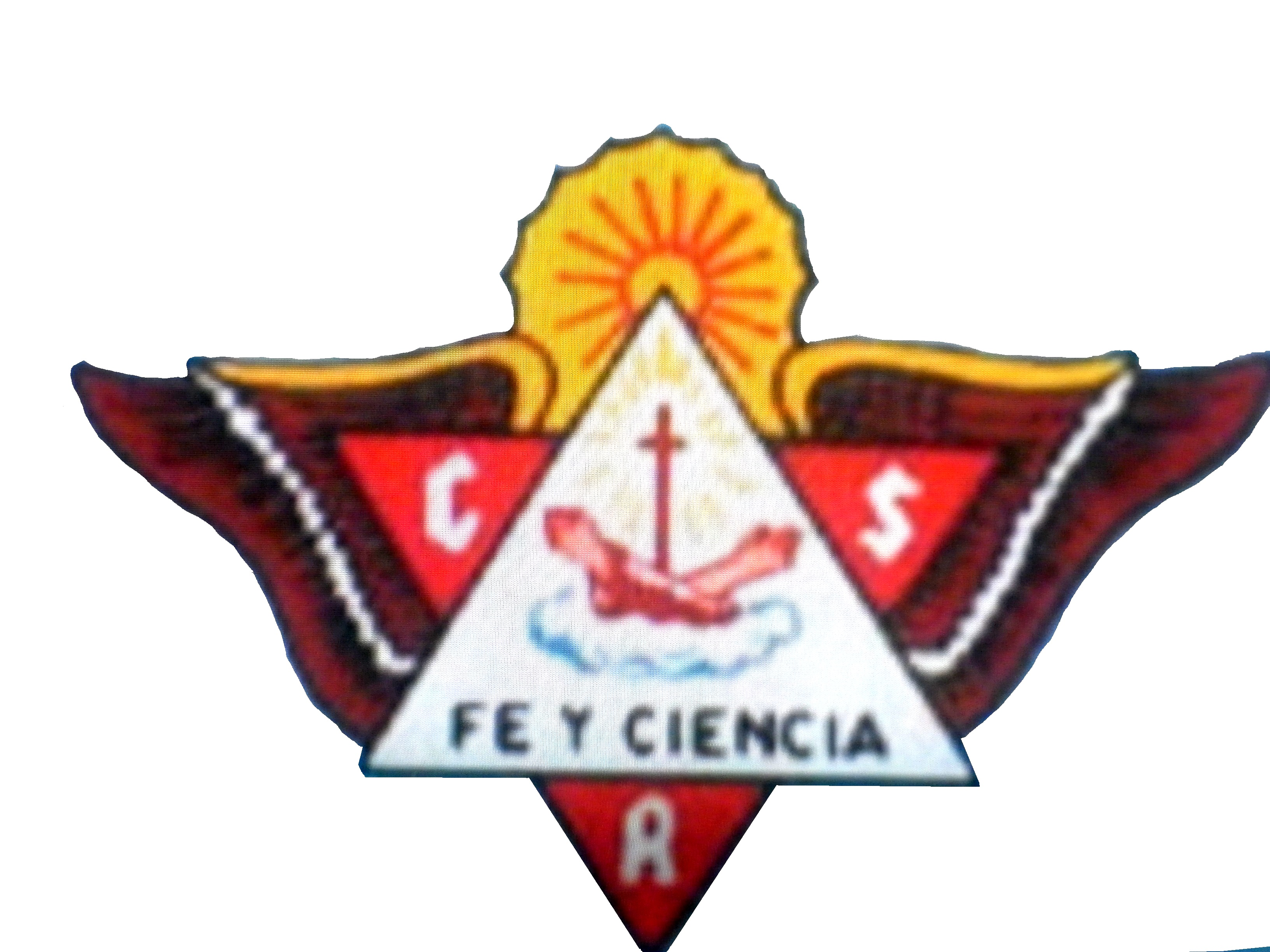 Insignia del Colegio Parroquial Franciscano San Román Runa Simi: San Ruman wallqanqa hatun llachay wasita